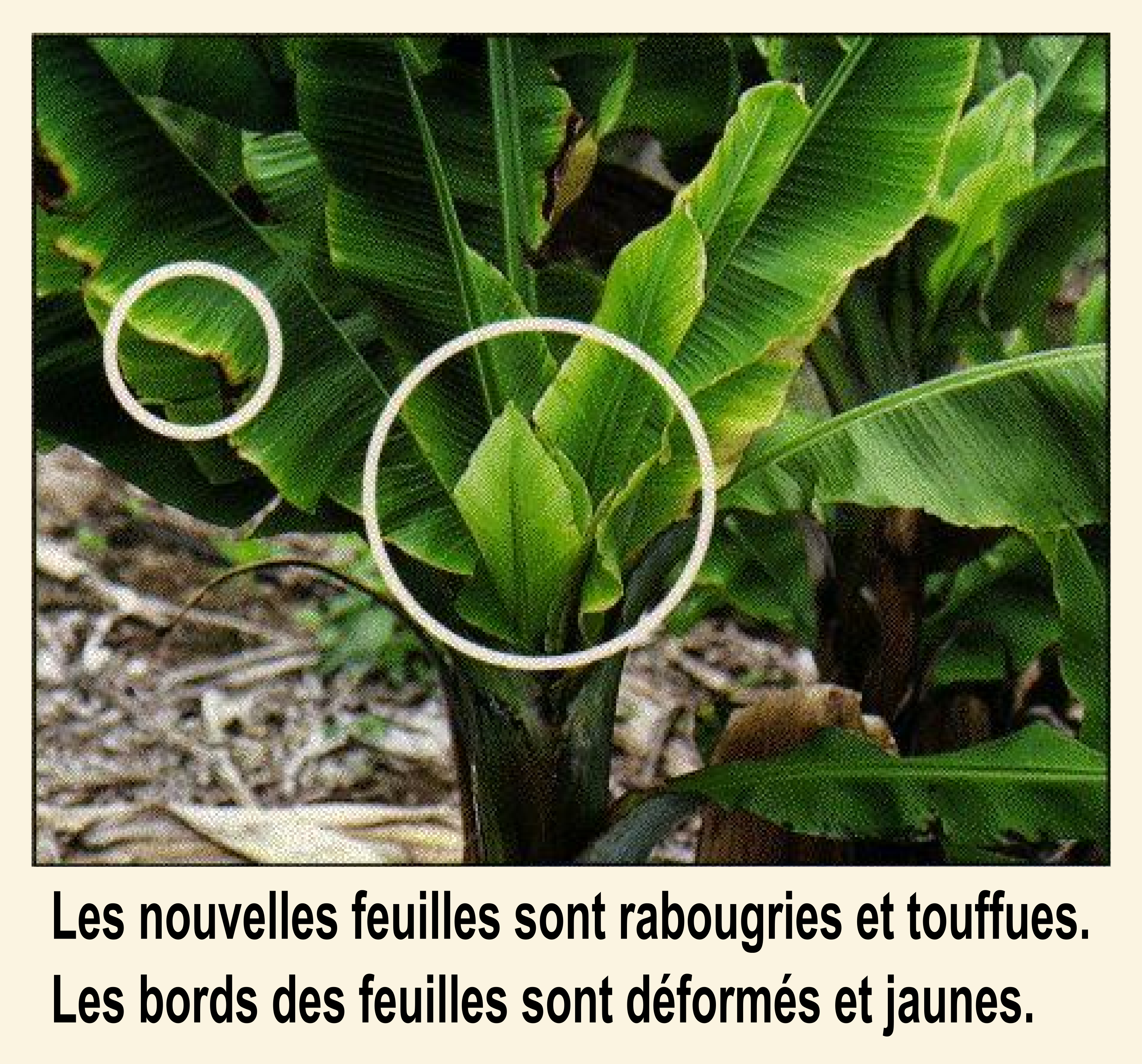 Symptômes du virus du bunchy top (sommet touffu) du bananier